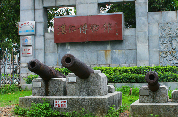 中文（中国大陆）: 湛江市博物馆大门